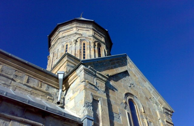 ღვთაების მონასტერი